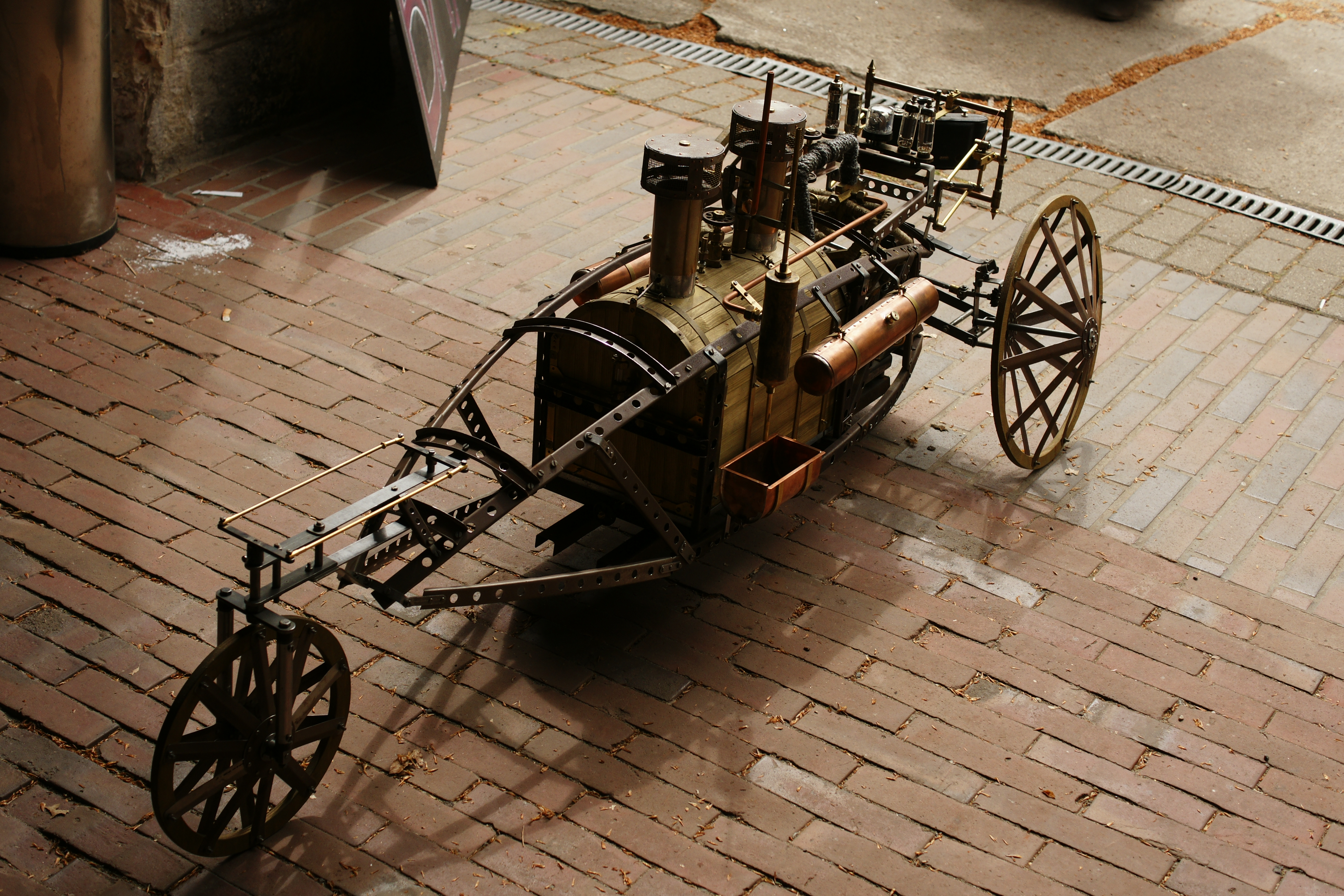 Steampunk Kunst- und Kulturfestival Festung Grauerort Stade